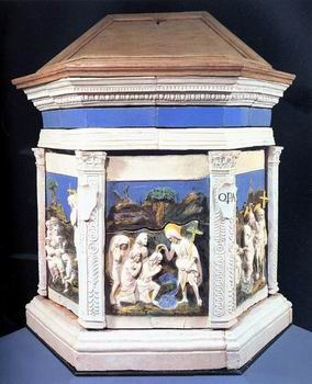 San giusto, fonte battesimale in maiolica con Storie del Battista, di Benedetto Buglioni